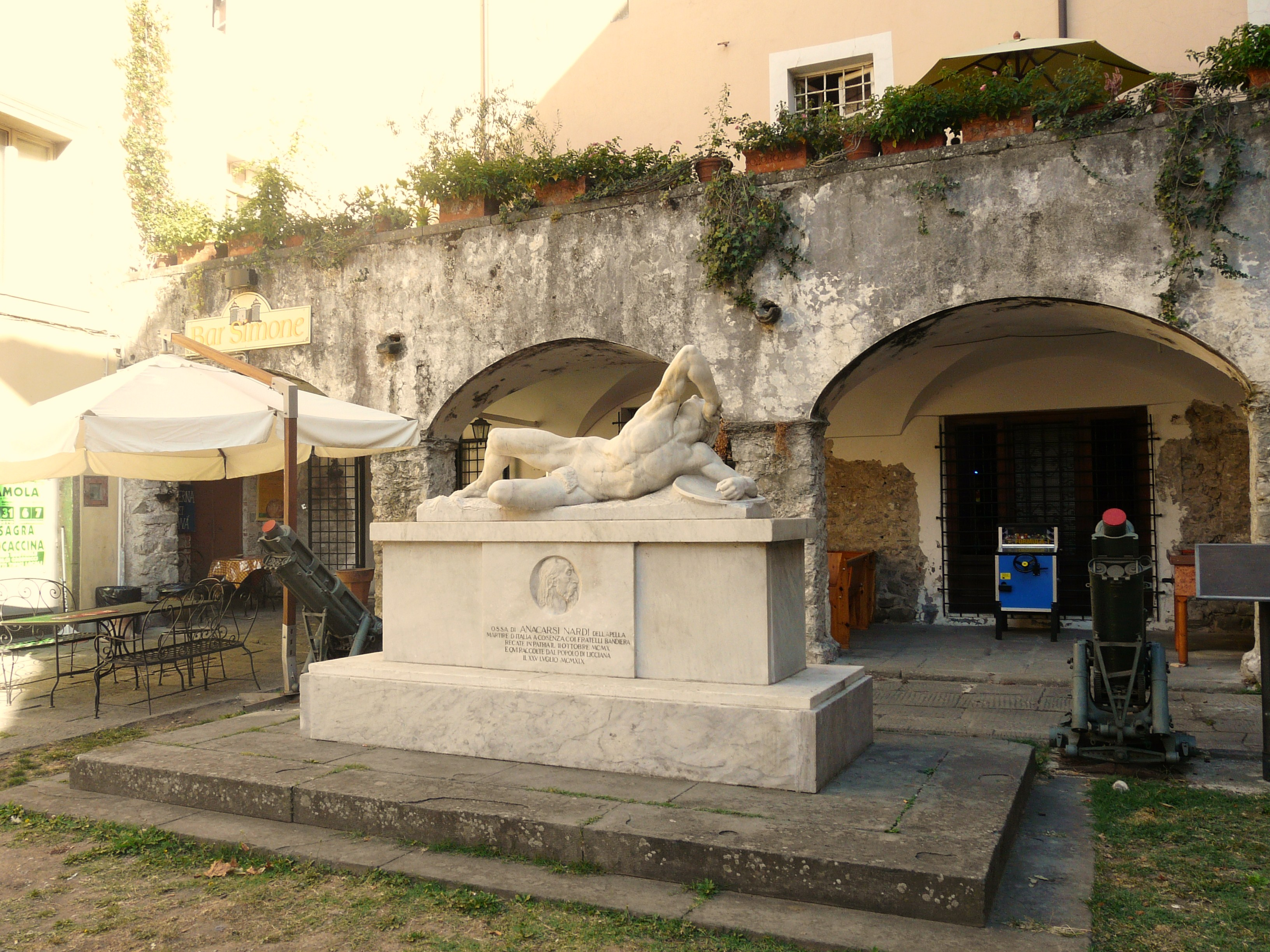 Monumento ad Anacarsi Nardi, Licciana Nardi, Toscana, Italia